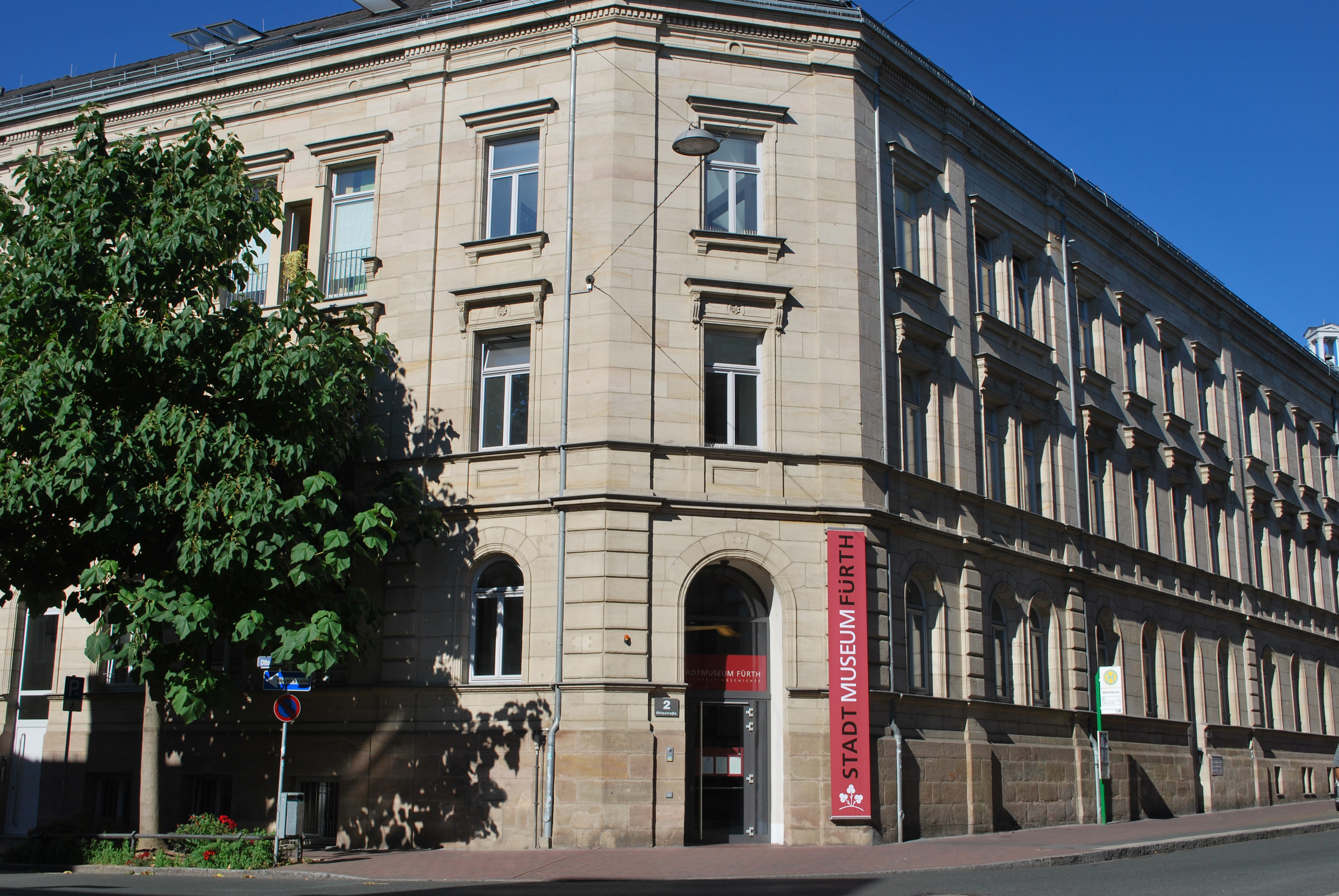 Das Fürther Stadtmuseum in der Innenstadt, 2016